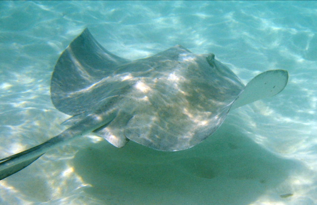 Stingray underwater